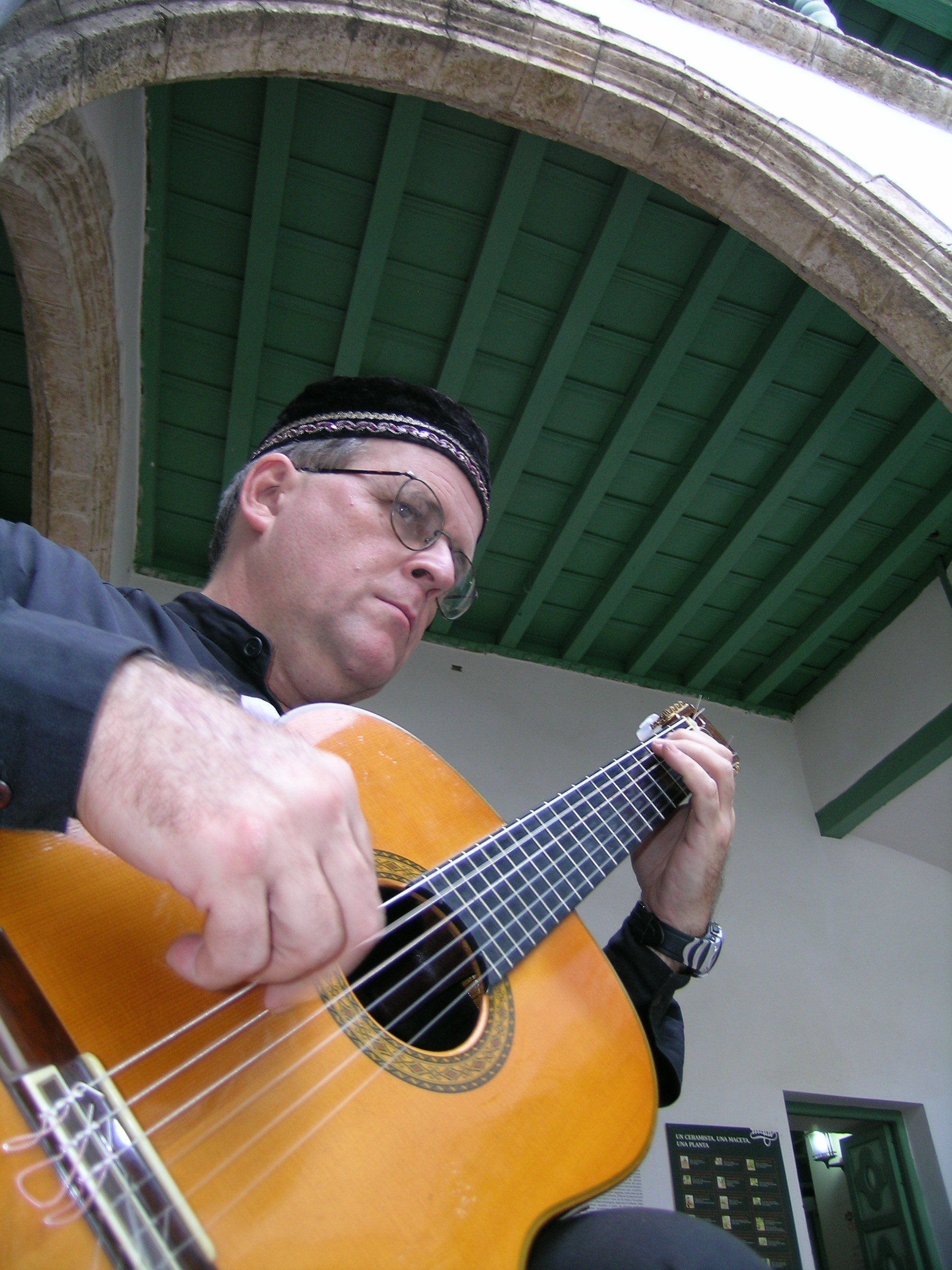 Gran concierto en el museo de Bellas Artes 2012